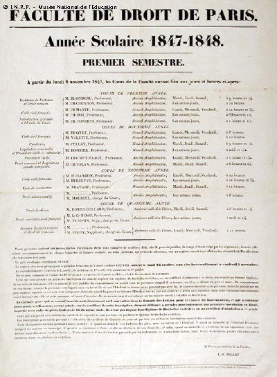 Affiche de la Faculté de droit de Paris 1847-1848